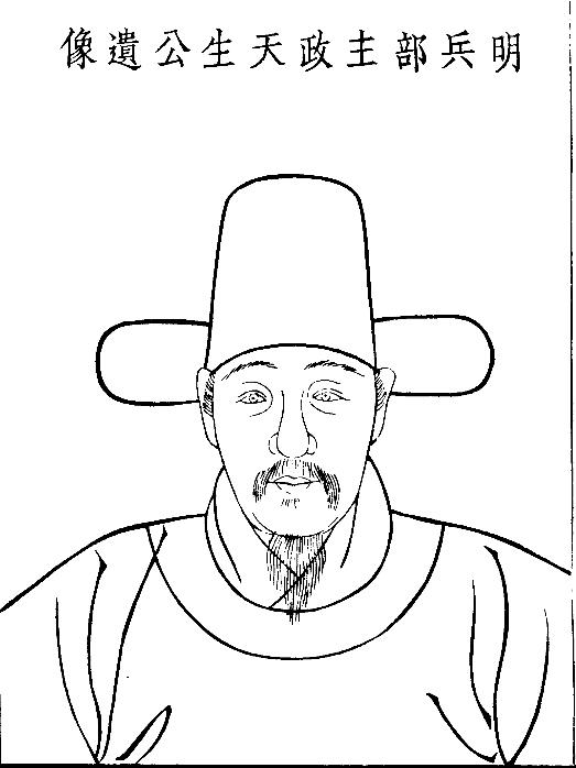 屠献辰像